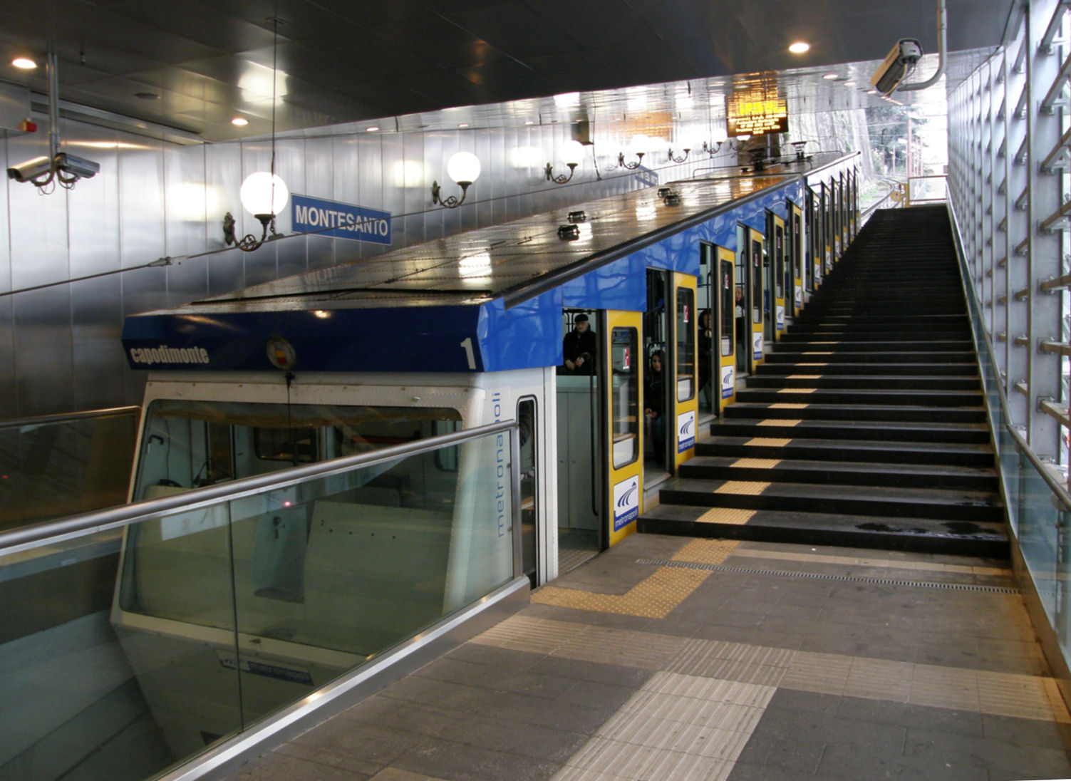 モンテサント線